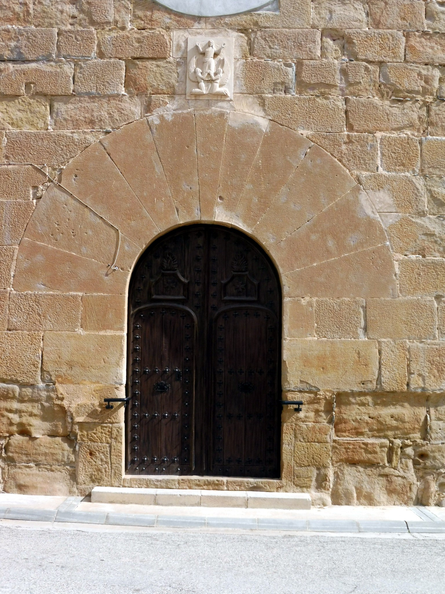 Església parroquial de l'Assumpció de Torrelameu: portada